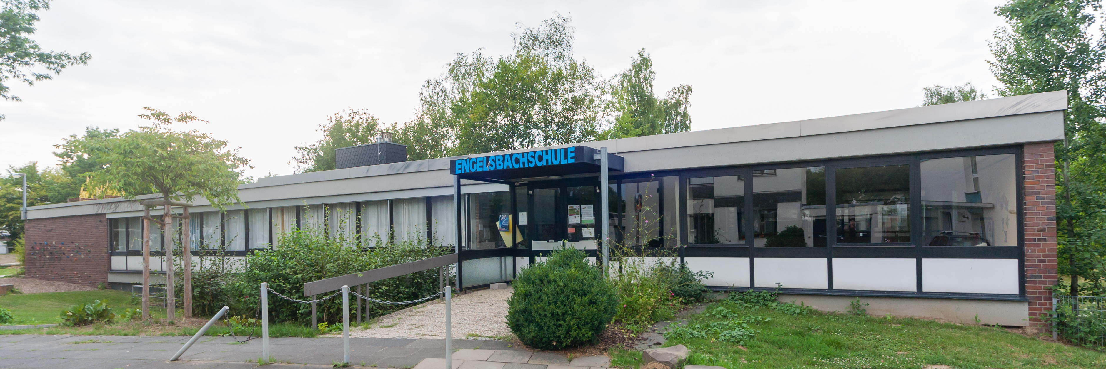 Engelsbachschule, Kath. Grundschule Ippendorf, Saalestraße 27, Bonn-Ippendorf: Blickrichtung Westen